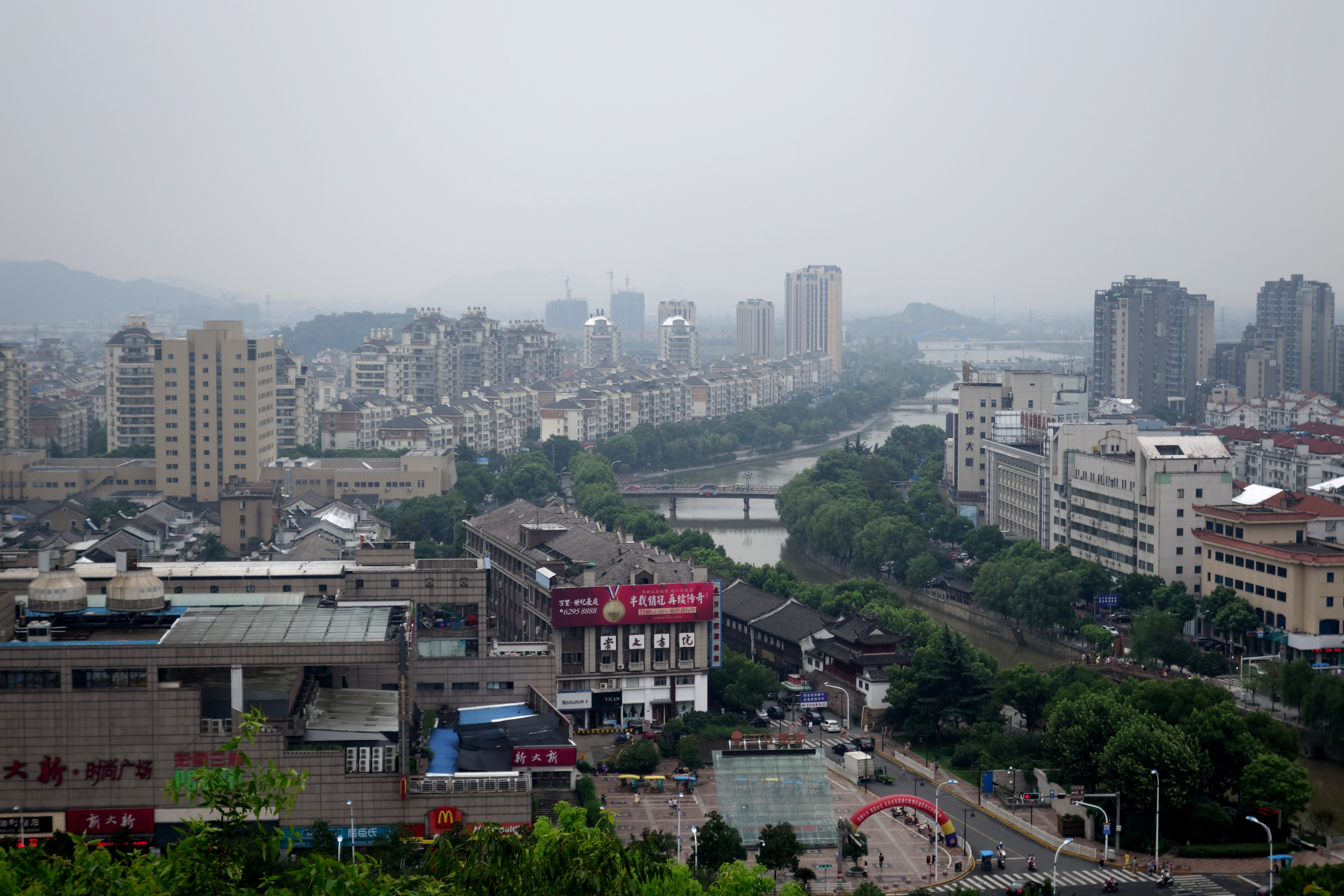 龙泉山余姚鸟瞰